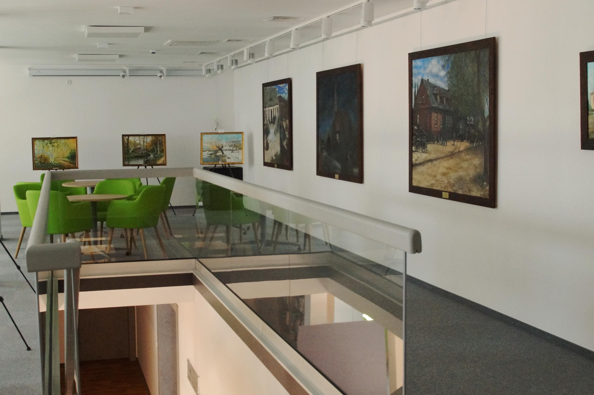 Gminna Biblioteka Publiczna, budynek Gminngo Centrum Kultury w Kłodawie, ul. Jeziorna 8